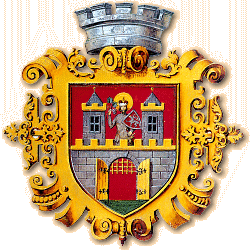 Znak pražské čtvrti Vinohrady